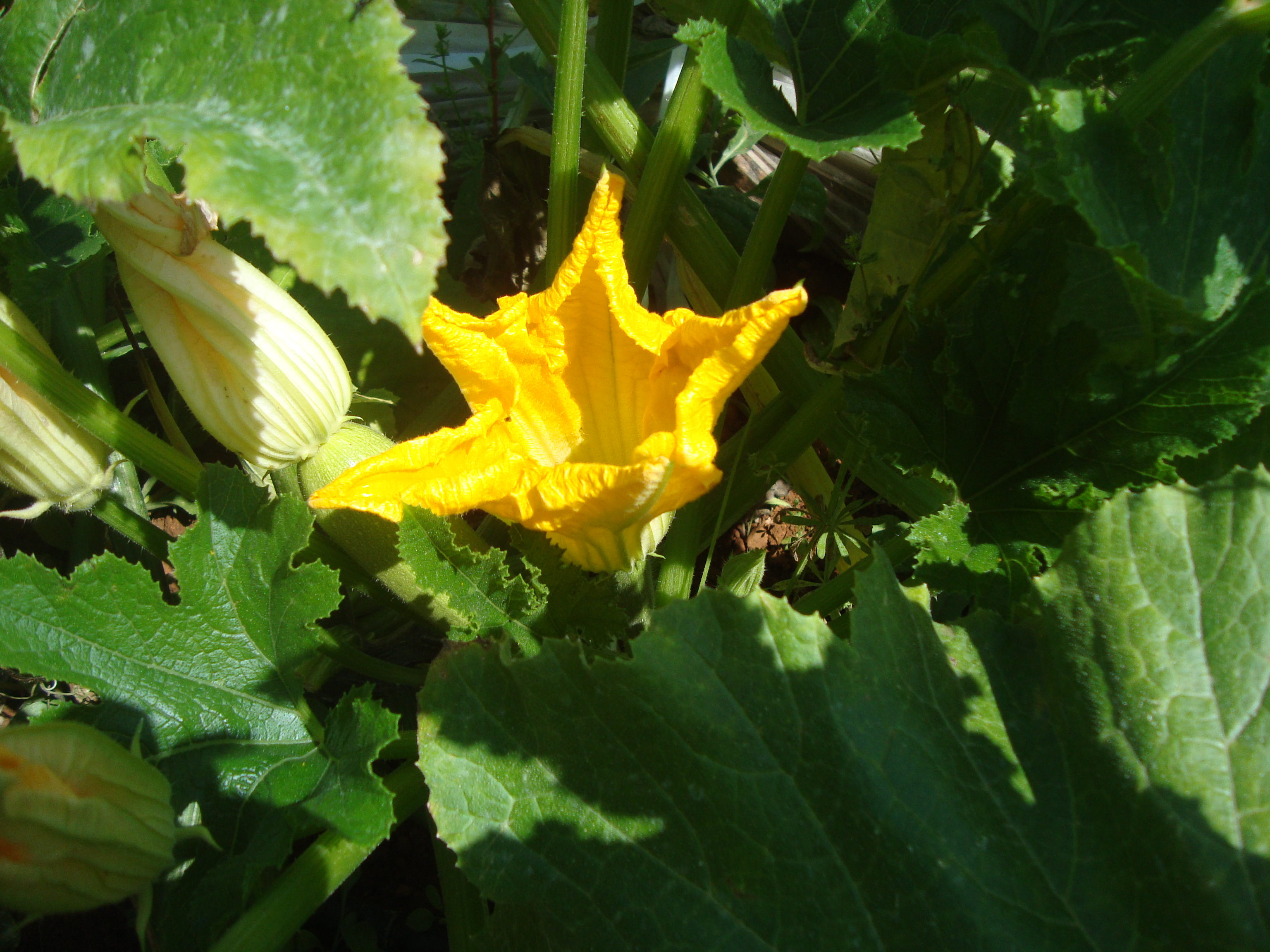 Flor de carabasí